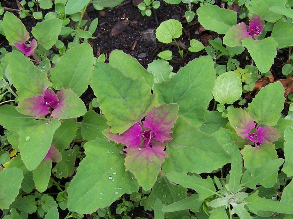 Chenopodium album (pl. komosa biała) - mutant